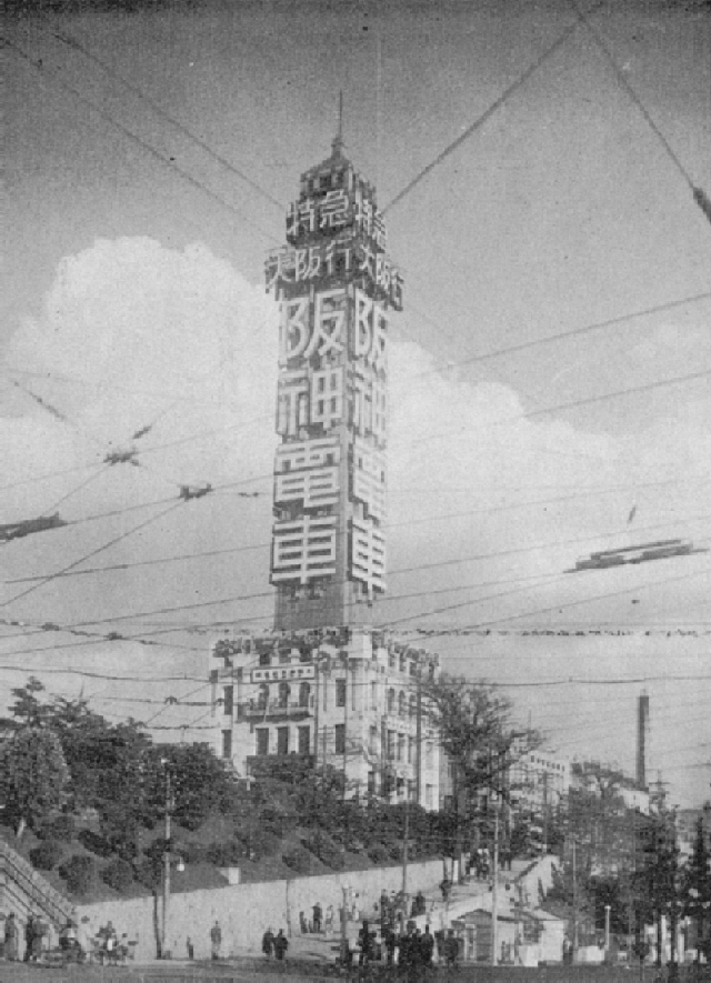 神戸タワー と湊川公園ホテル、奥の煙突は湊川温泉